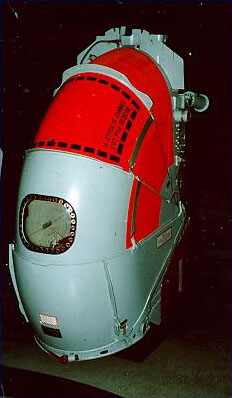 Convair B-58A Escape capsule